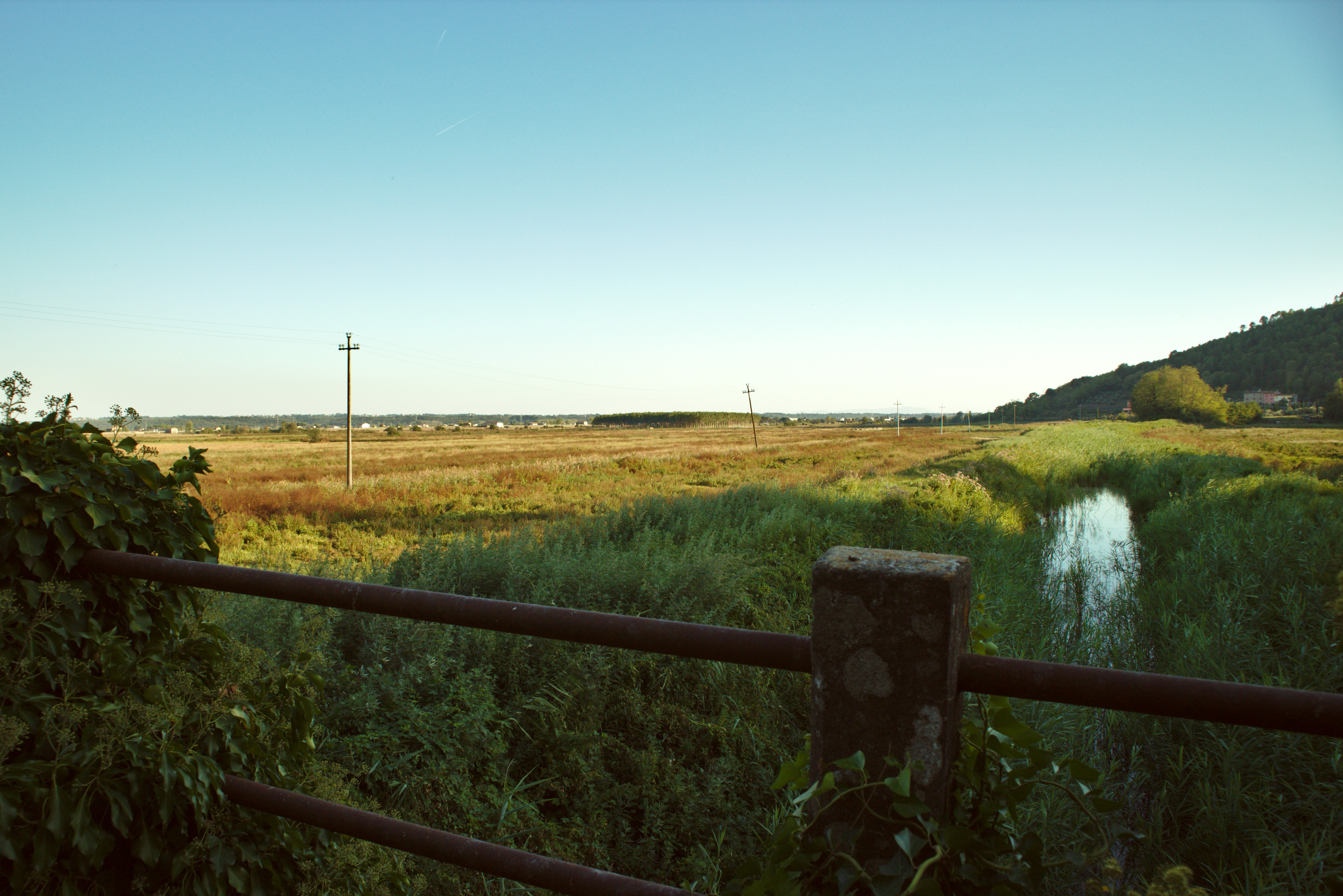 Bosco di Tanali, vista sul ex lago di Bientina. This is a photo of a monument which is part of cultural heritage of Italy.